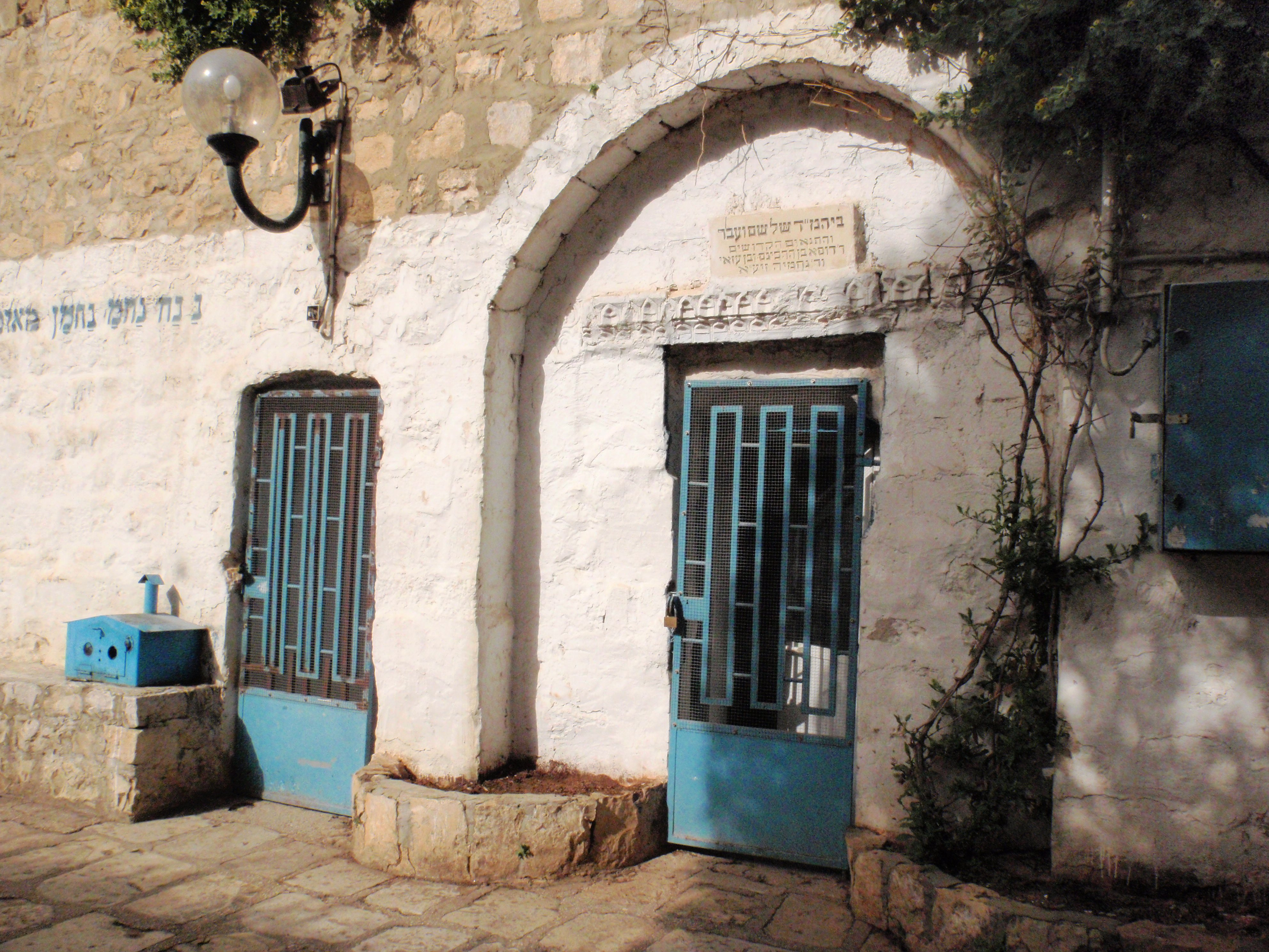 בית המדרש של שם ועבר